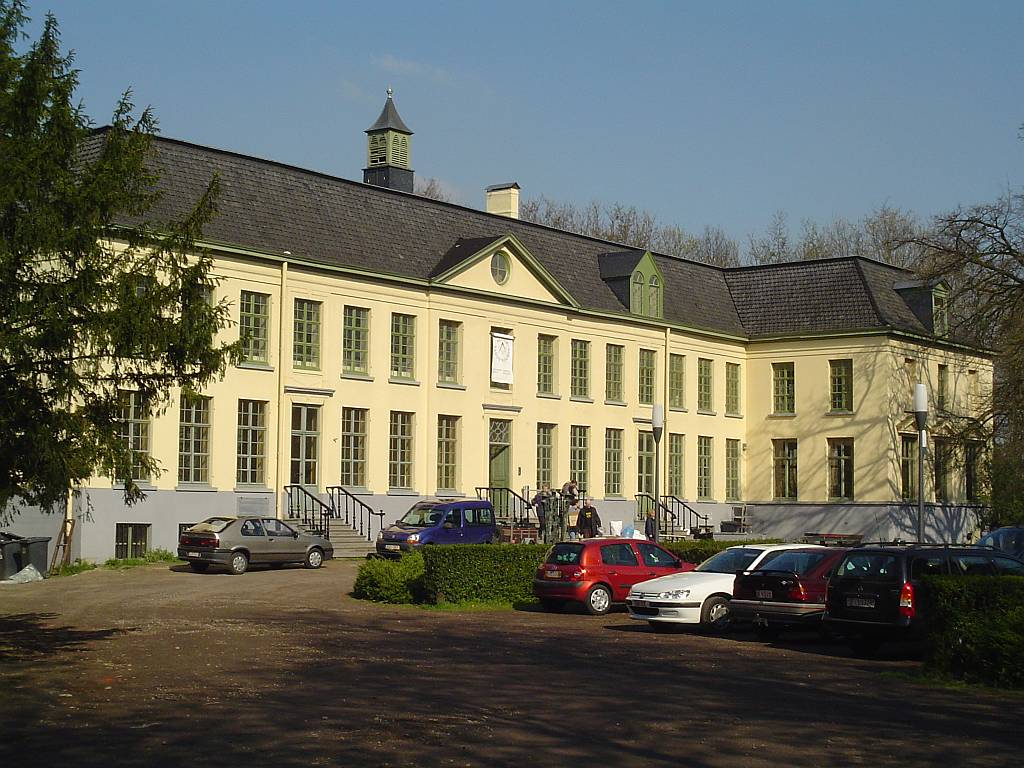 Kasteel De Campagne in Drongen bij Gent in België